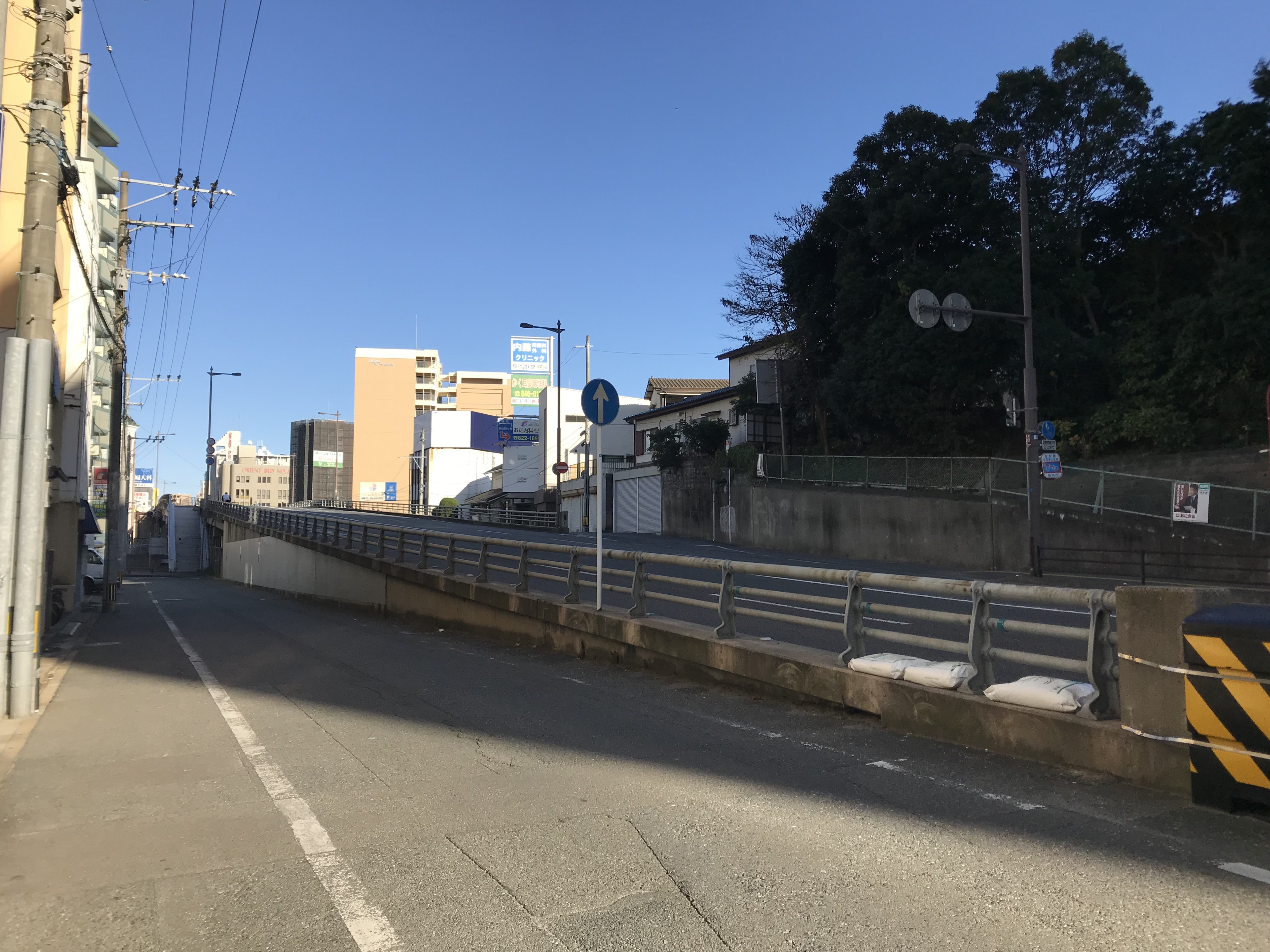 別府駅付近の別府大橋